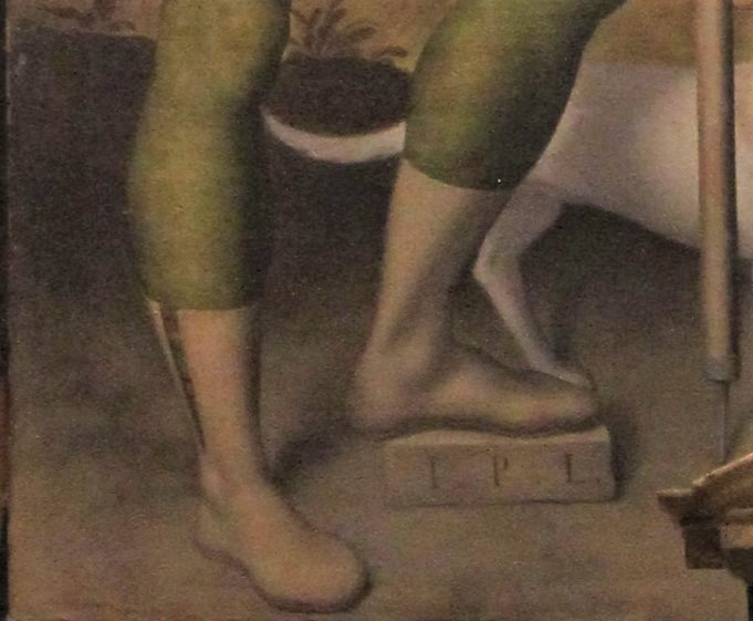 particolare del dipintoMadonna con Bambino e santi Rocco e Sebastiano